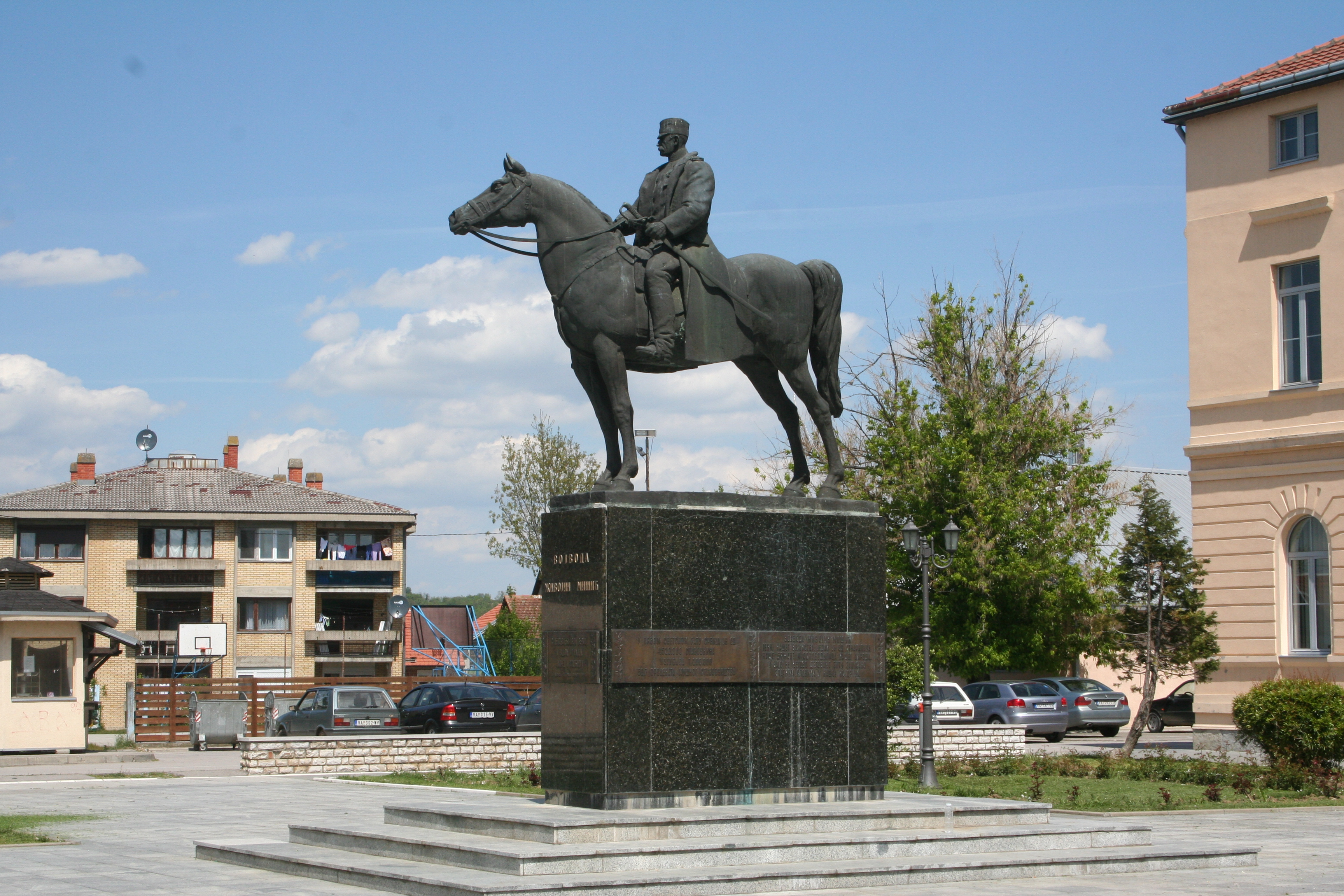 Mionica i spomenici u njoj